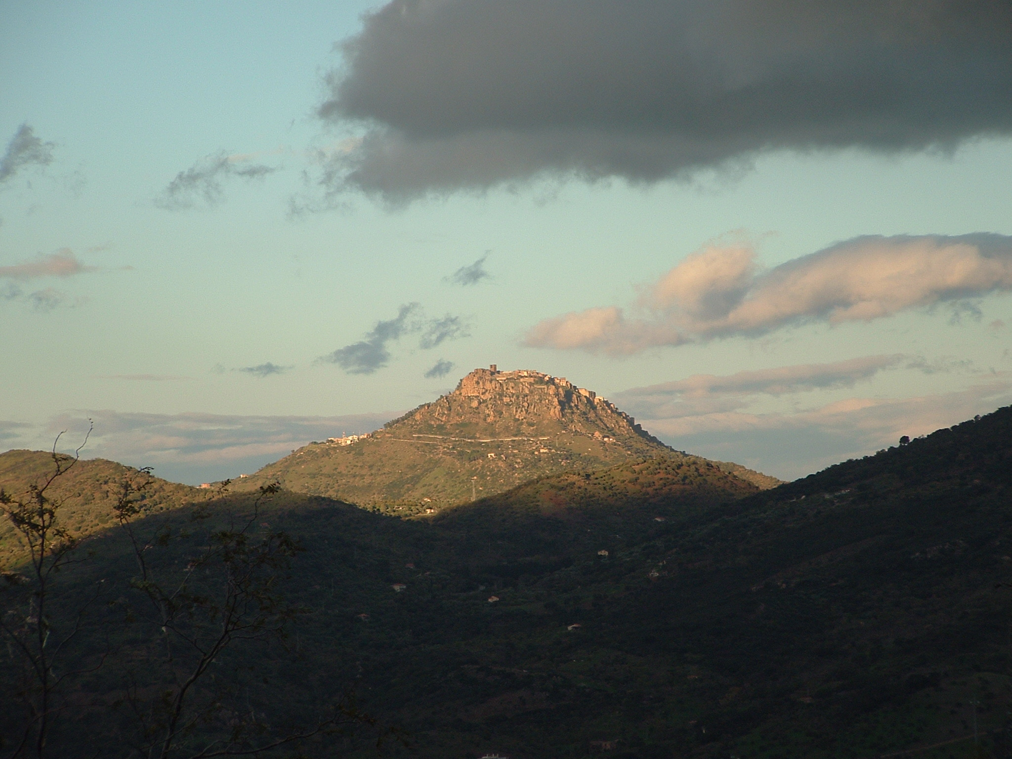 Panorama von Motta d’Affermo in Sizilien, Italien, Provinz Messina